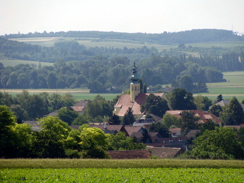 Blick auf die Kirche von Rückersdorf-Harmannsdorf